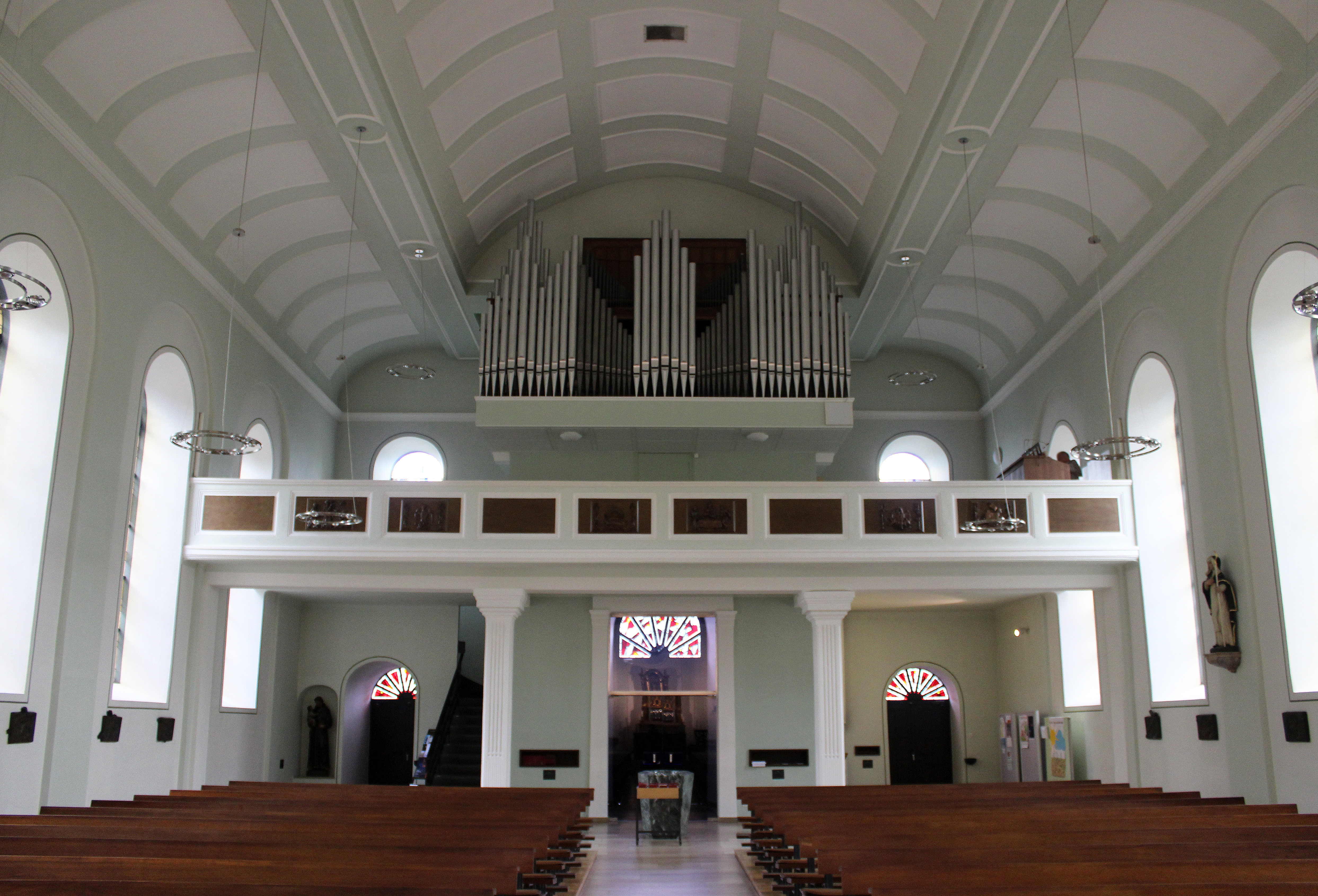 Blick ins Innere der katholischen Kirche St. Johann in Dillingen, Landkreis Saarlouis, Saarland